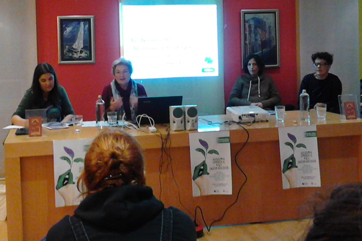 Da nosa esquerda á nosa dereita: Isabel Vilalba, Adela Figueroa, Dora Cabaleiro e Elena Ferro na mesa redonda 'activismos pola sustentabilidade', mantida o 30 de novembro de 2018 na Casa das Letras en Ribadeo, organizada polo Observatorio da Mariña pola Igualdade.